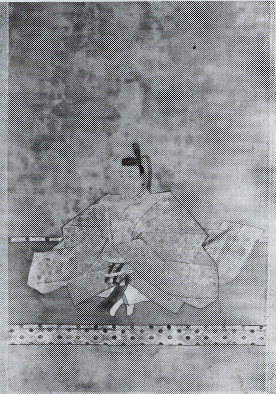 相良長在の肖像(モノクロ)。